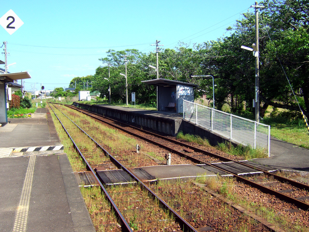 松浦鉄道楠久駅（Matsuura Railway Kusuku Station）